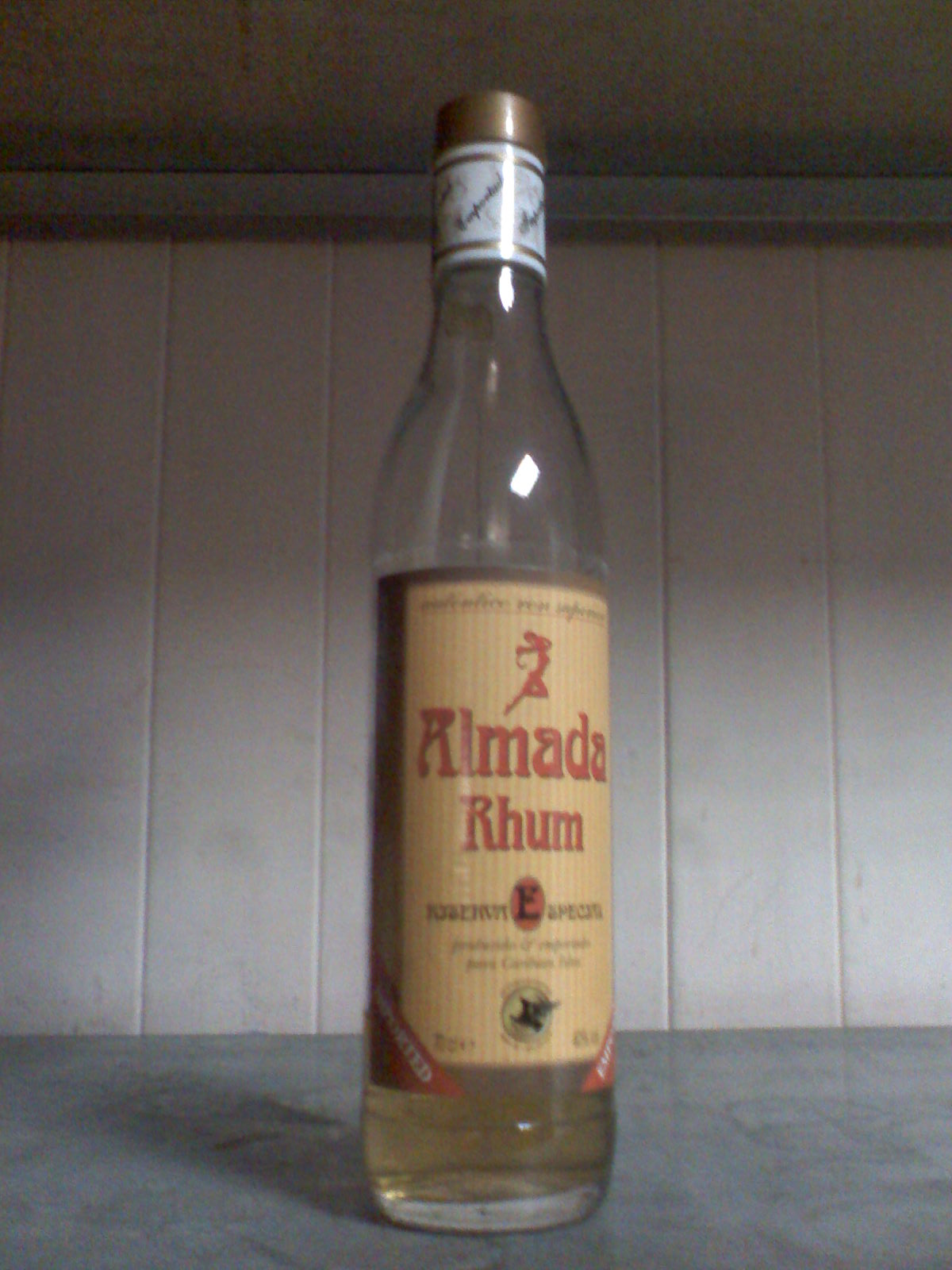 In un bar di Roma.